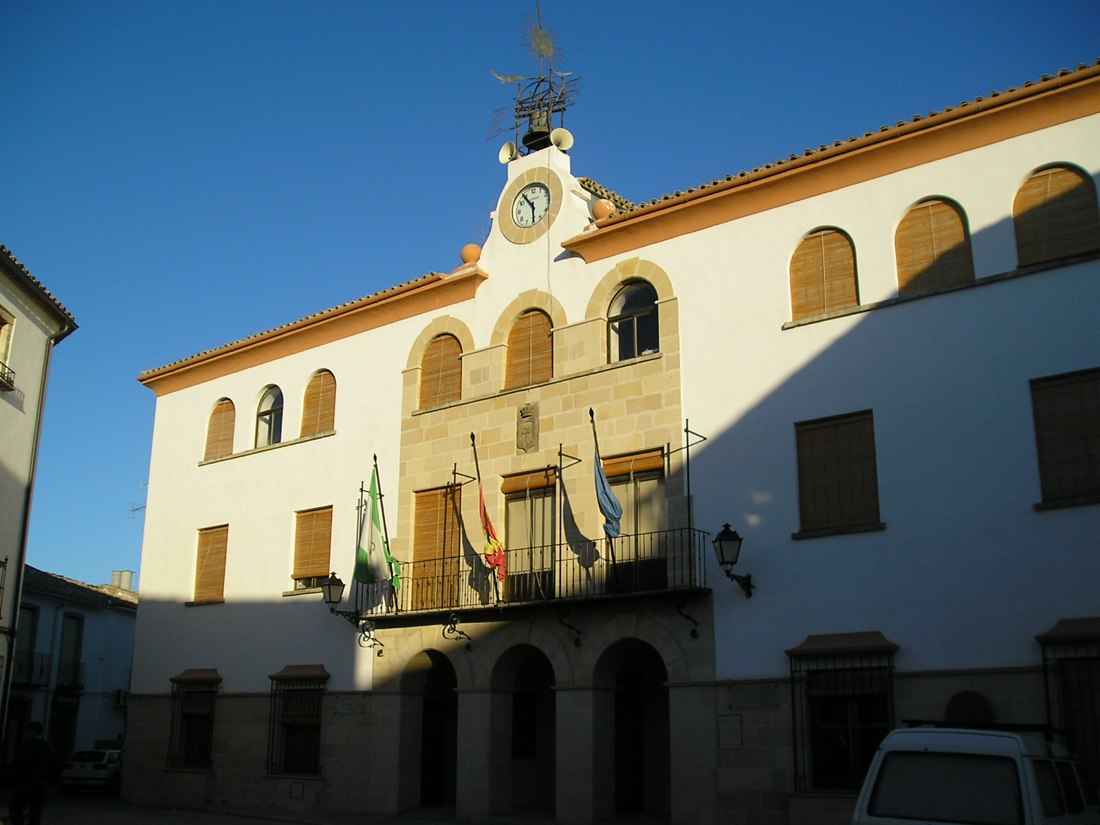 Ayuntamiento de Sabiote